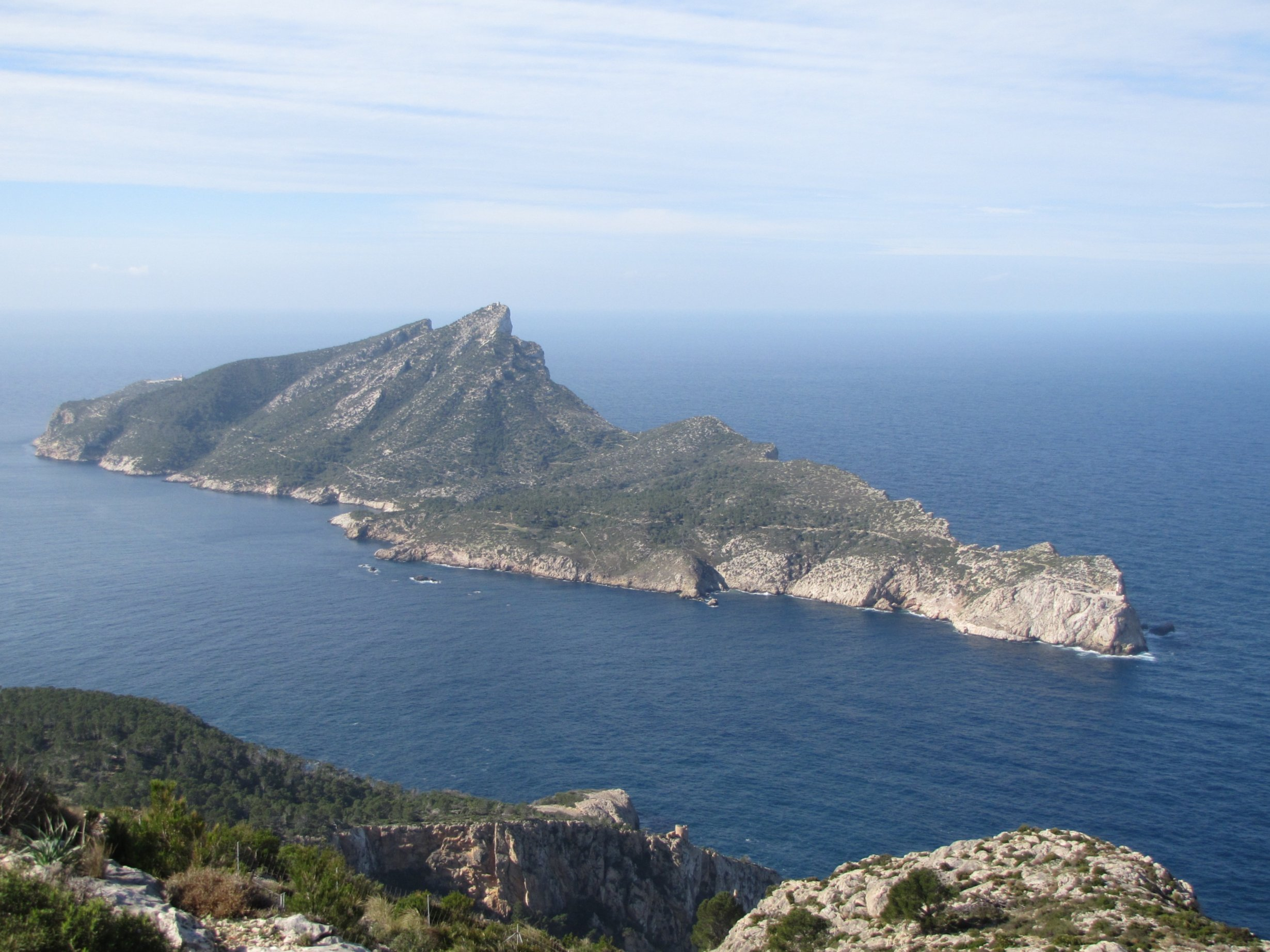 Sa Dragonera